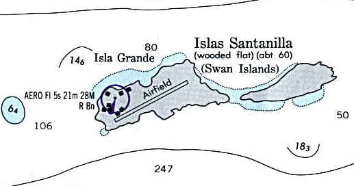 Nautische Karte der Swan Islands